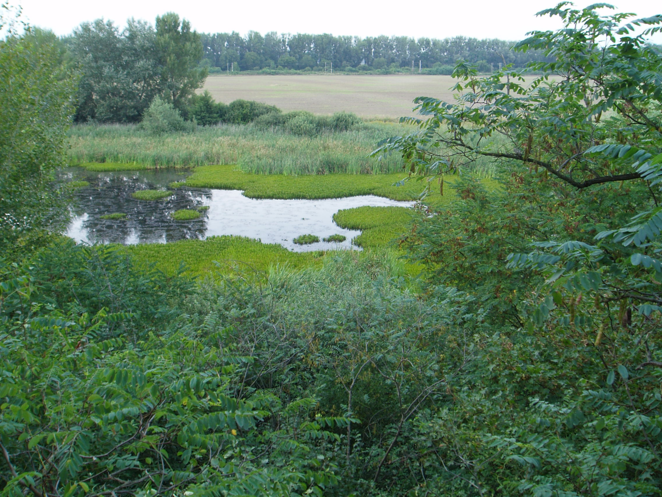 Narure resevation Tajba near Streda nad Bodrogom in east Slovakia